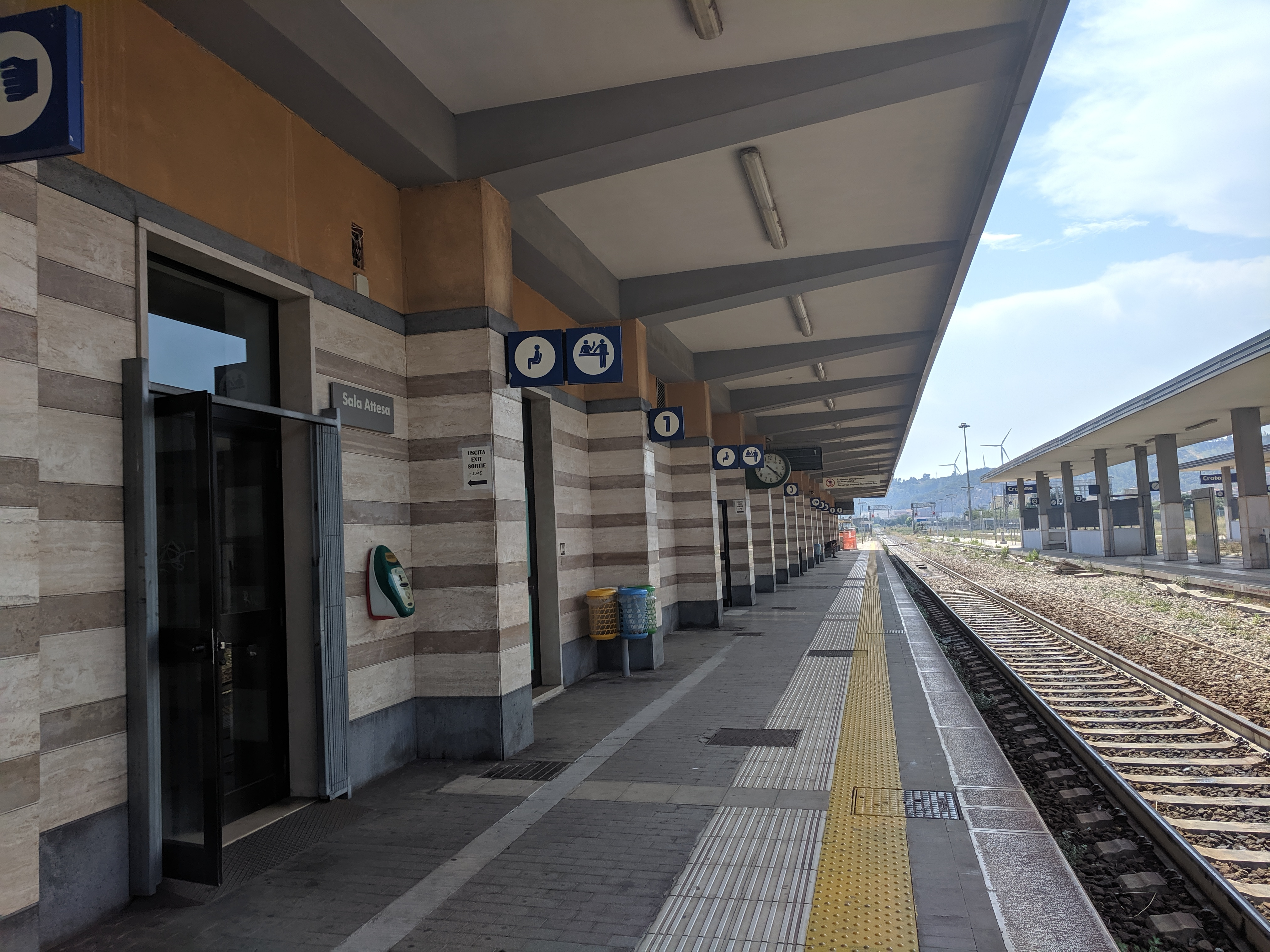 Vista binario 1 della stazione di Crotone